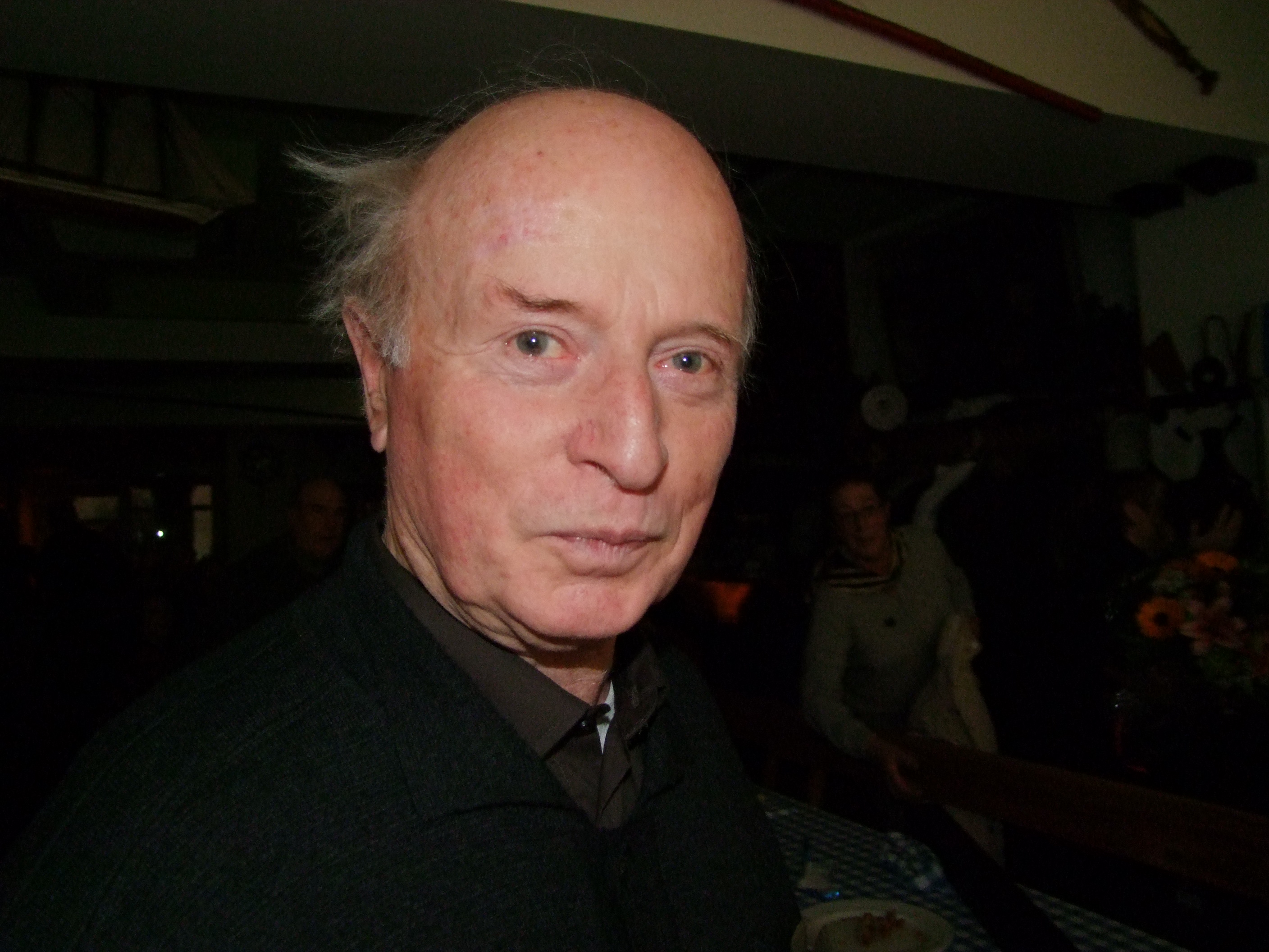 Jean Louis Davant idazle zuberotarrari omenaldia Getarian. Nabarralde Kultur Elkarteak egina, 2009ko abenduaren 3an.